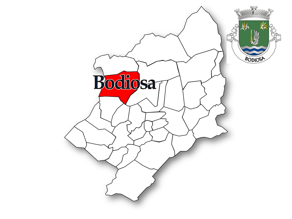 População